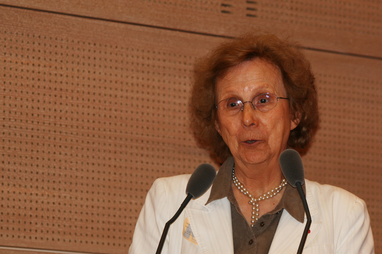 Elisabeth de Fontenay lors d'une reunion de commémoration du 1er anniversaire de la mort d'André Wormser au palais du Luxembourg le 3 avril 2009.